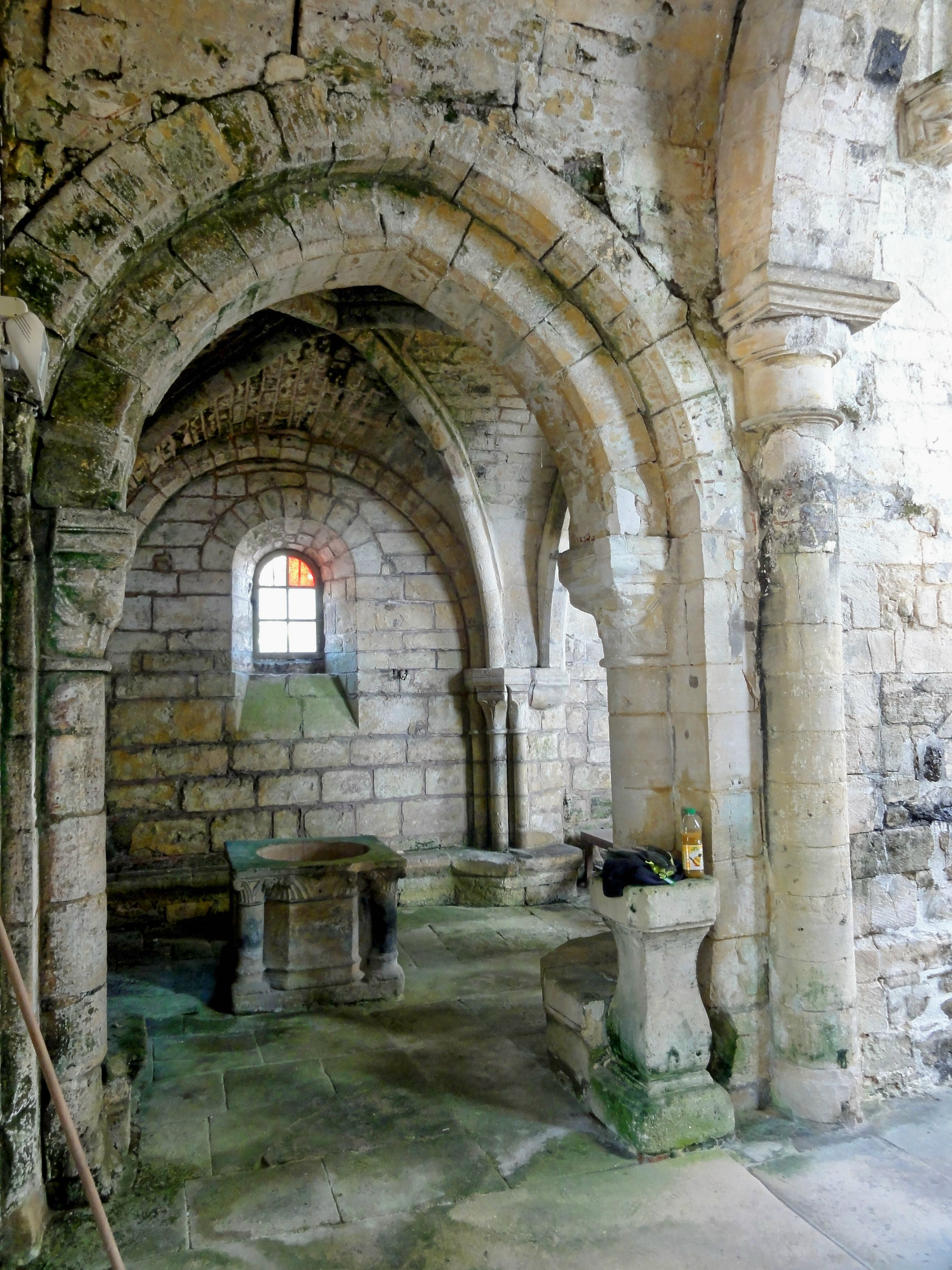 Chapelle des fonts baptismaux, vue depuis la base du clocher.